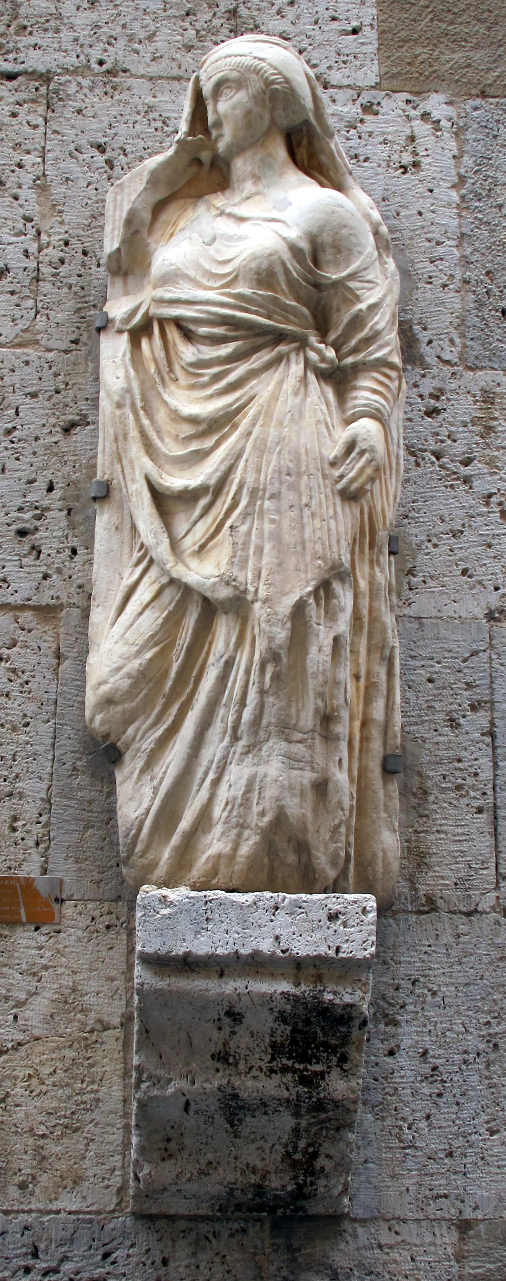 Pisa, Toscana